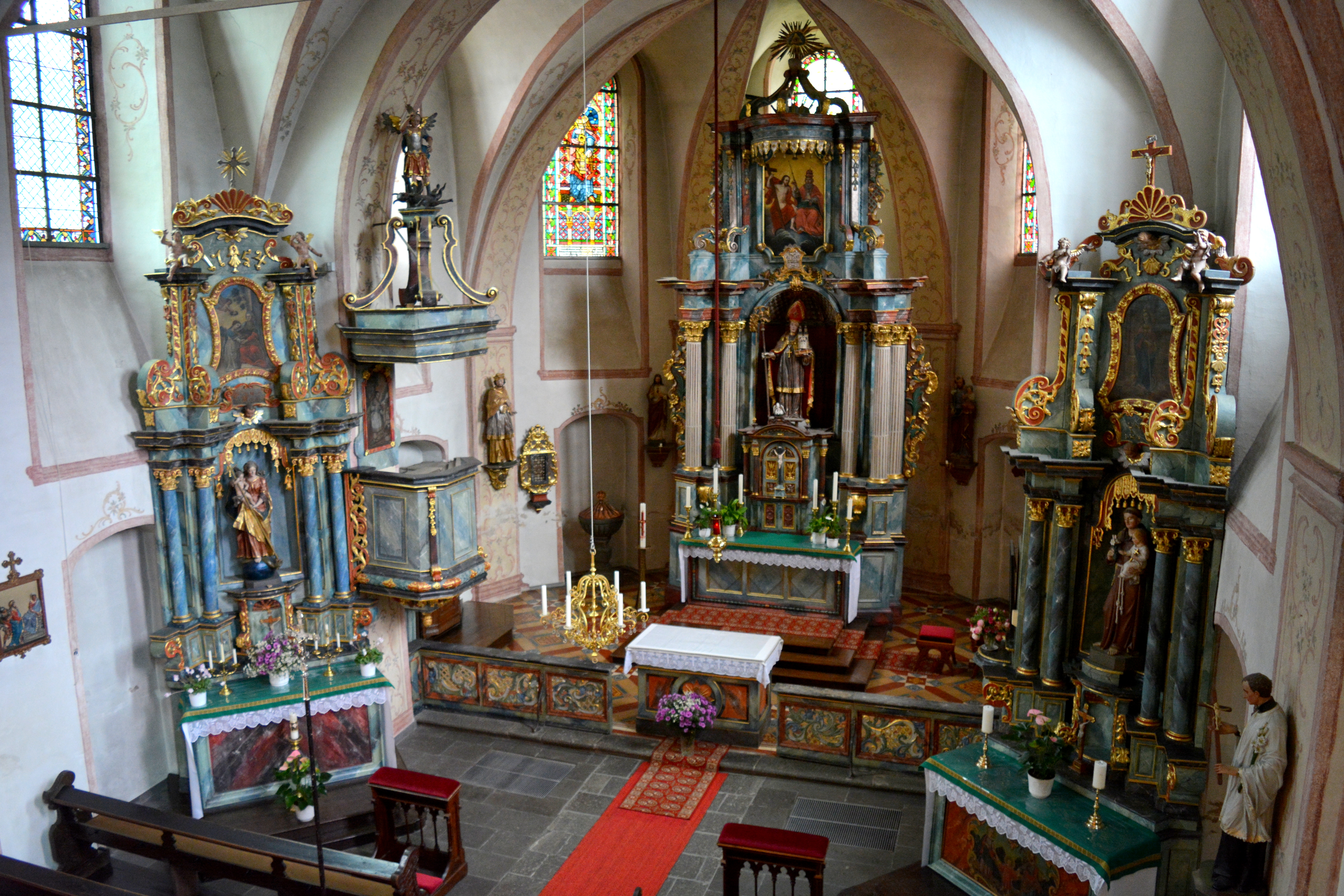 Lütz, St. Maximin, Innenansicht